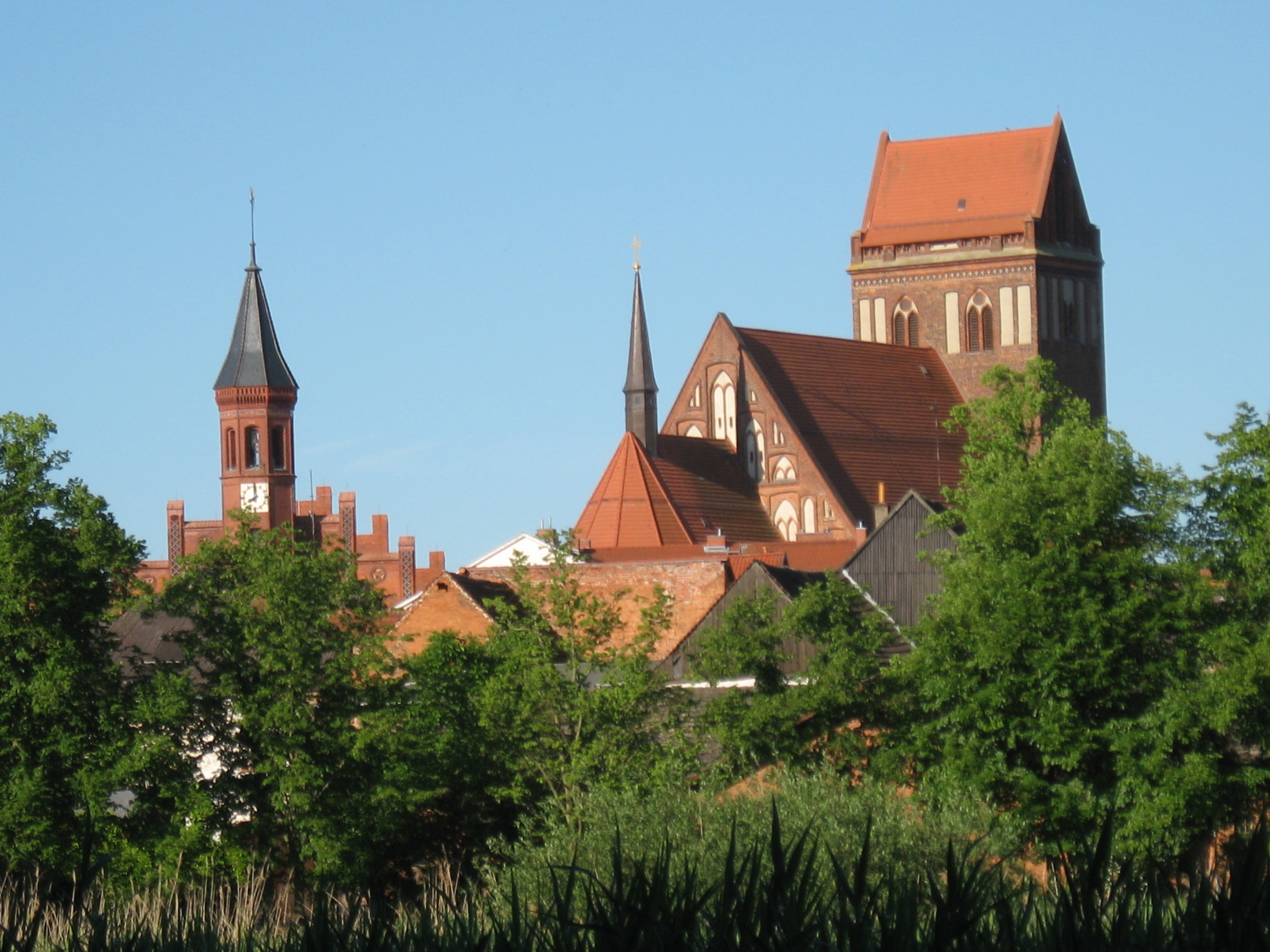 Blick vom Hagen auf das Perleberger Rathaus (links) und der St. Jacobi Kirche (rechts)